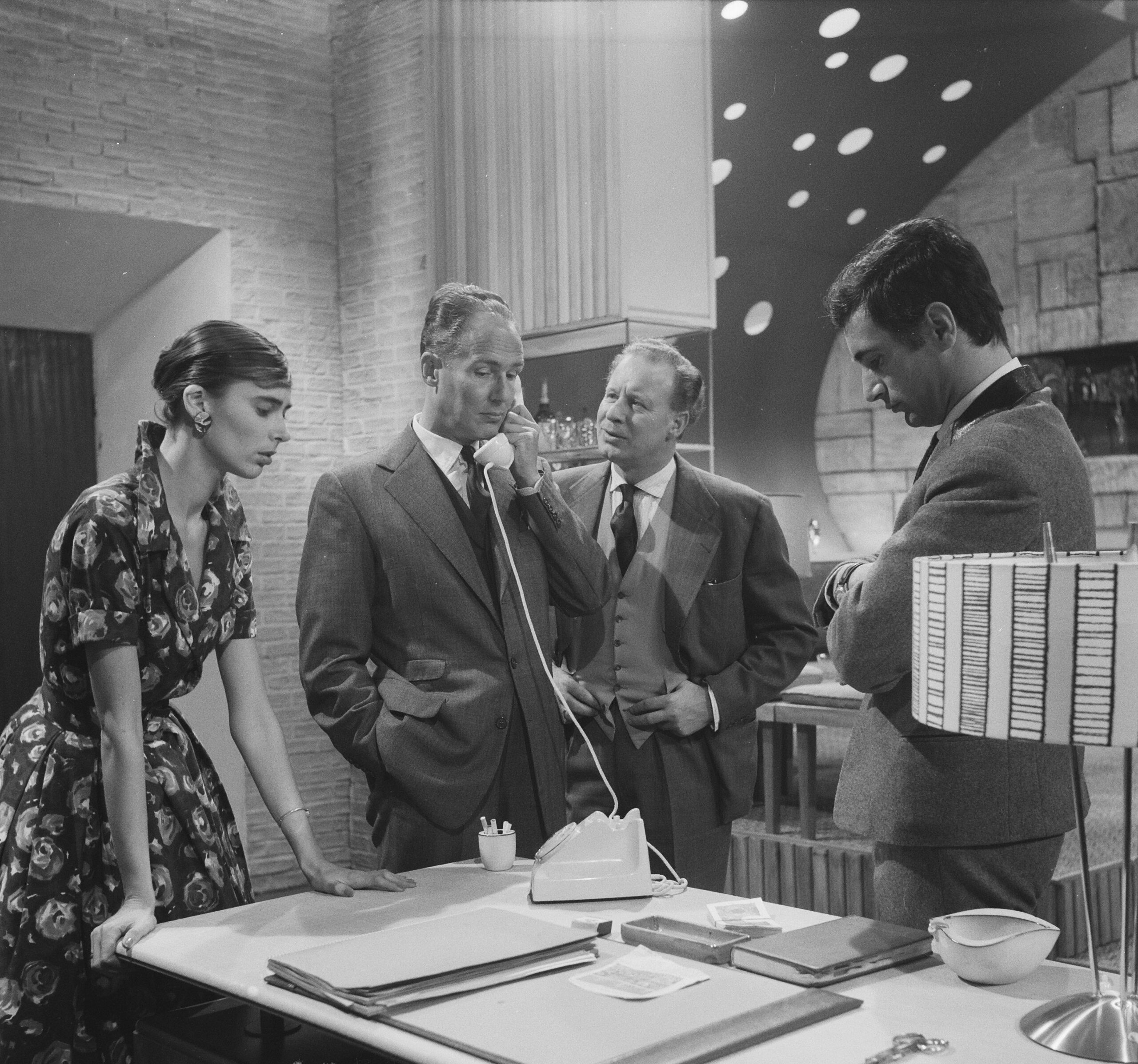 Collectie / Archief : Fotocollectie Anefo Reportage / Serie : [ onbekend ] Beschrijving : Televisiespel "U spreekt met uw moordenaar" met Guus Oster, Sigrid Koetse, Jan Retel en Maxim Hamel Datum : 14 september 1960 Trefwoorden : Televisiespellen Persoonsnaam : Hamel, Maxim, Koetse, Sigrid, Oster, Guus, Retel, Jan Fotograaf : Rossem, Wim van / Anefo Auteursrechthebbende : Nationaal Archief Materiaalsoort : Negatief (zwart/wit) Nummer archiefinventaris : bekijk toegang 2.24.01.03 Bestanddeelnummer : 911-5999